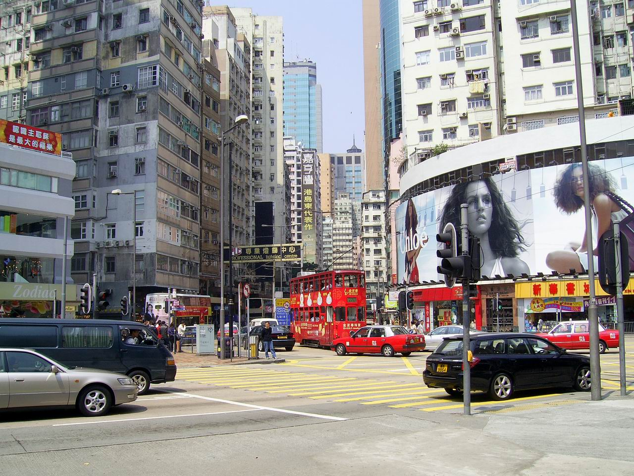 摩理臣山道與天樂里之交匯點